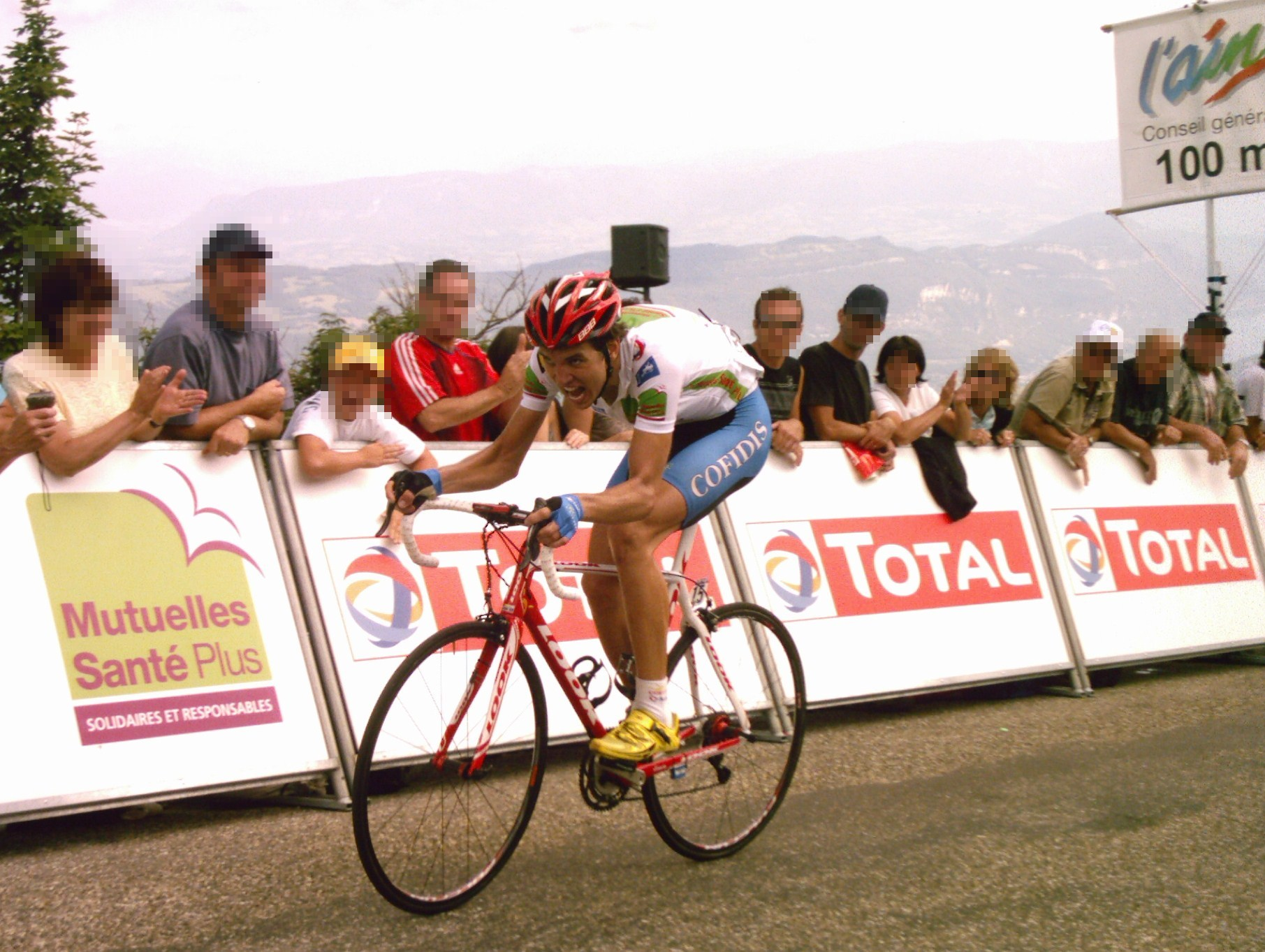 Rein Taaramae vainqueur de la quatrième étape du Tour de l'Ain 2009.